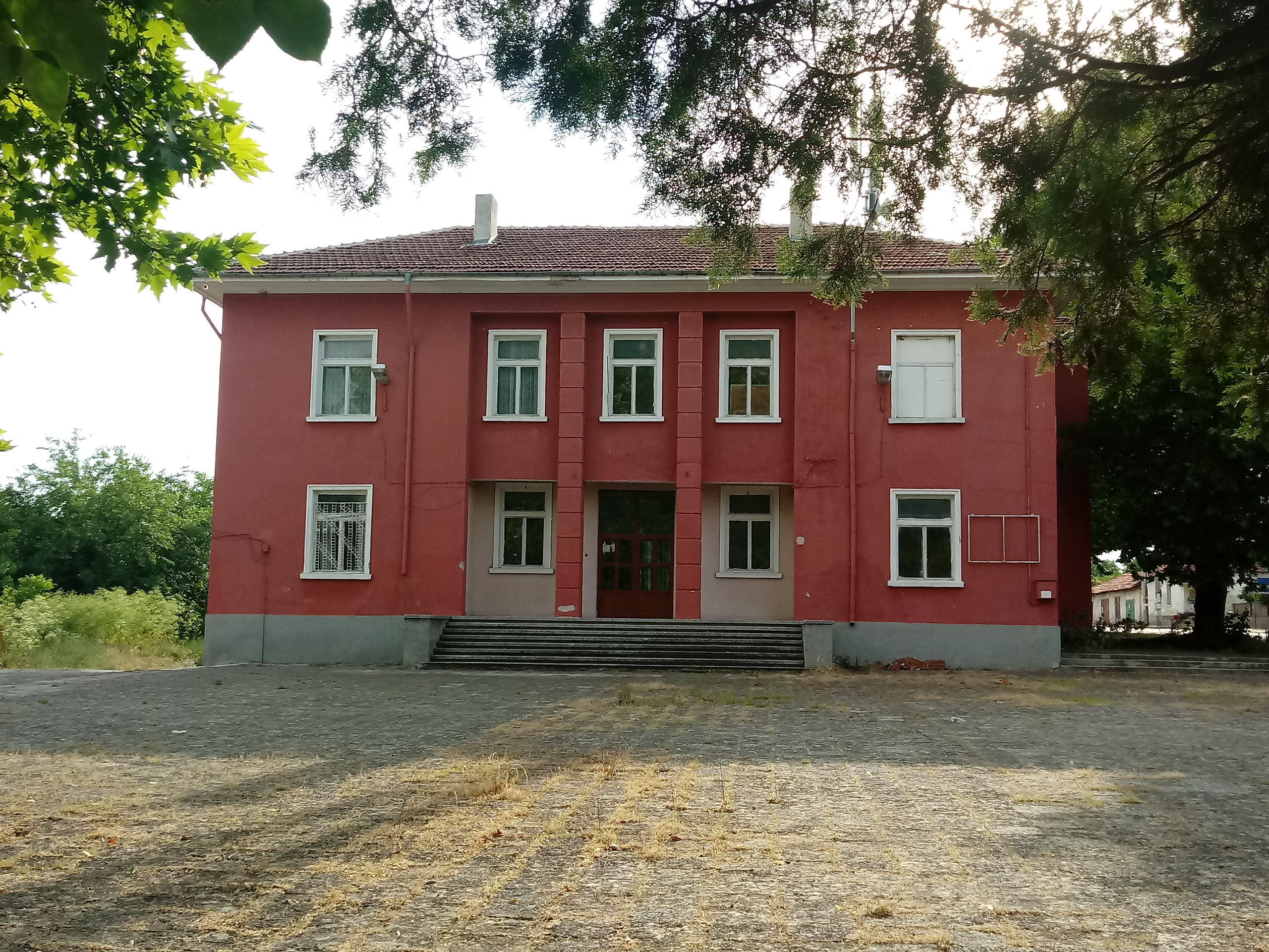 Читалище „Христо Смирненски 1929“ в с. Бяла река